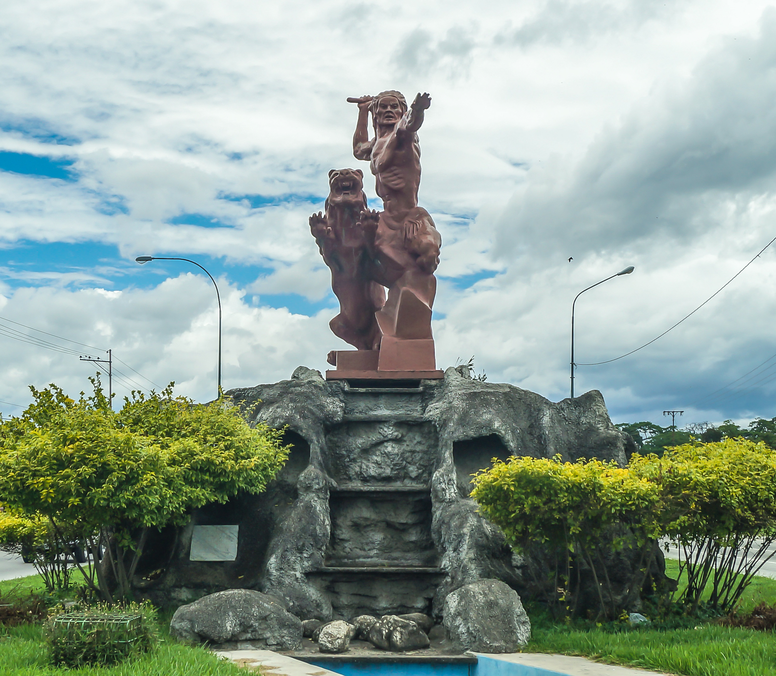 Indio Yara en la localidad de San Felipe. Estado Yaracuy. Venezuela.